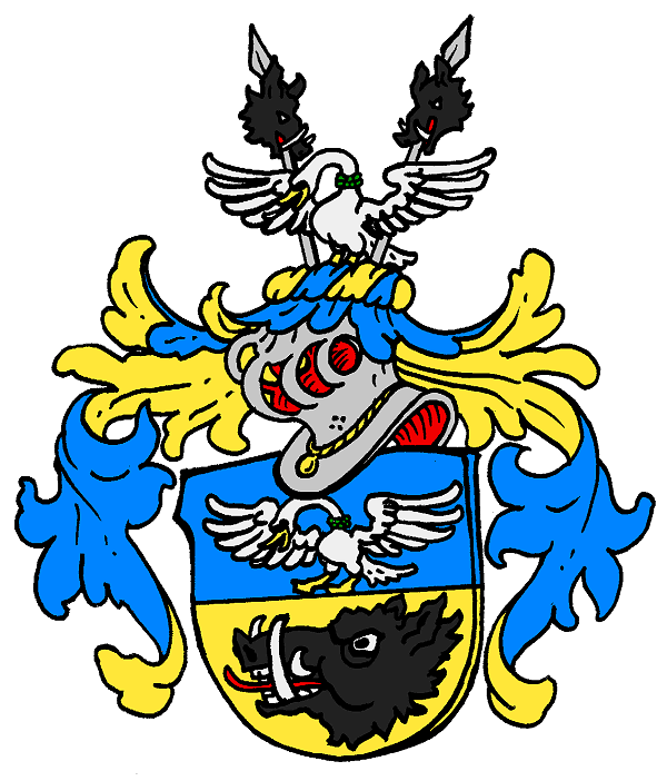 Stammwappen der von Orth